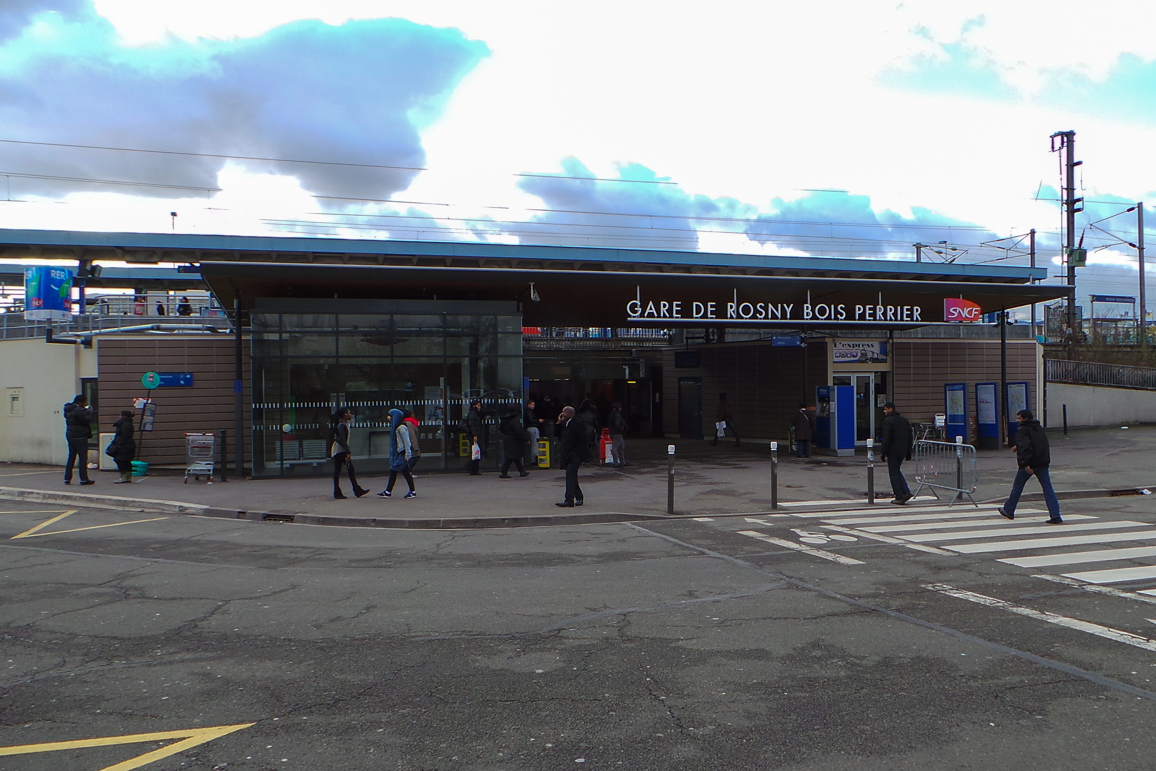 Gare de Rosny - Bois-Perrier - RER E (Paris, France)